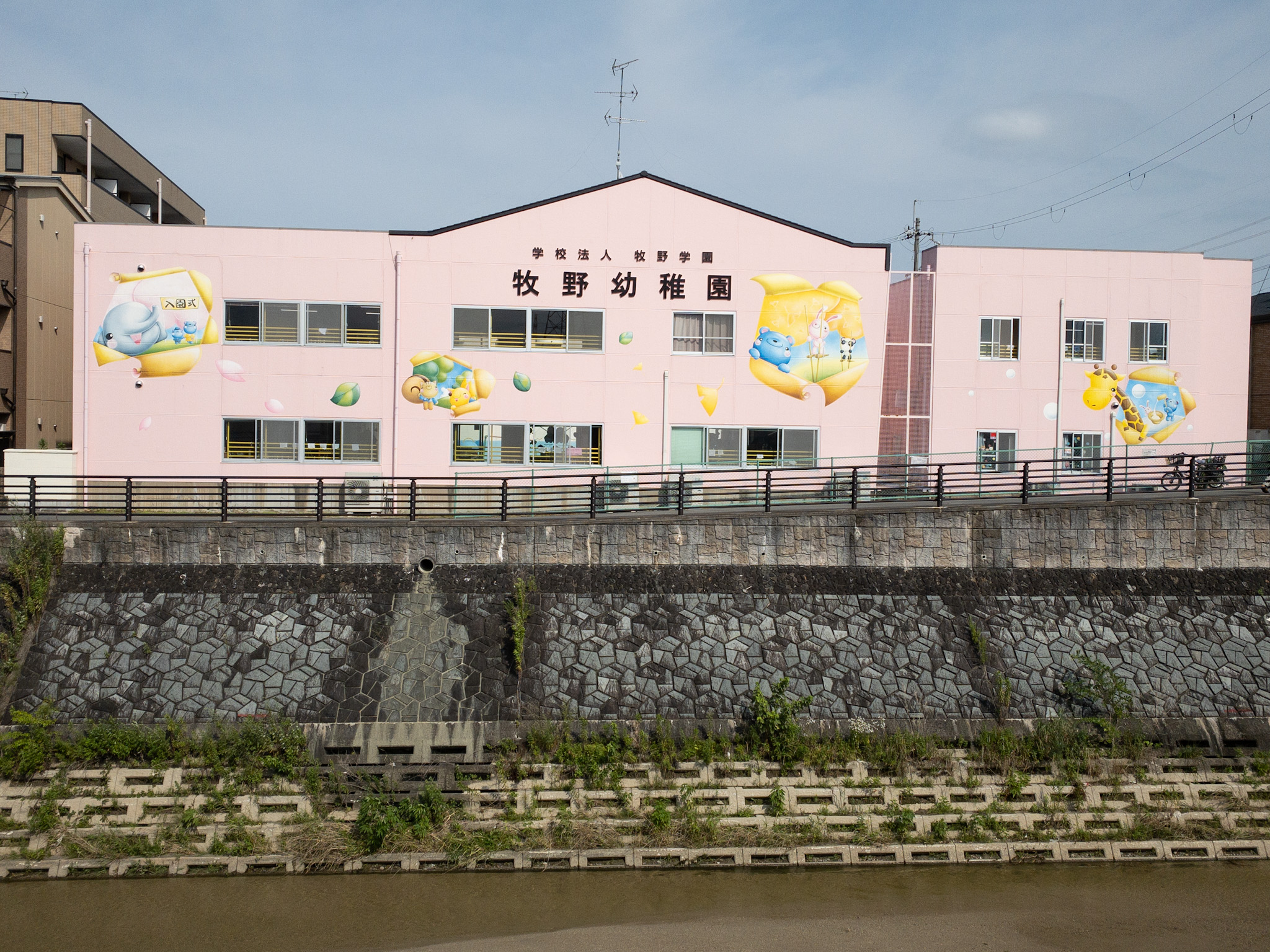 学校法人牧野学園牧野幼稚園